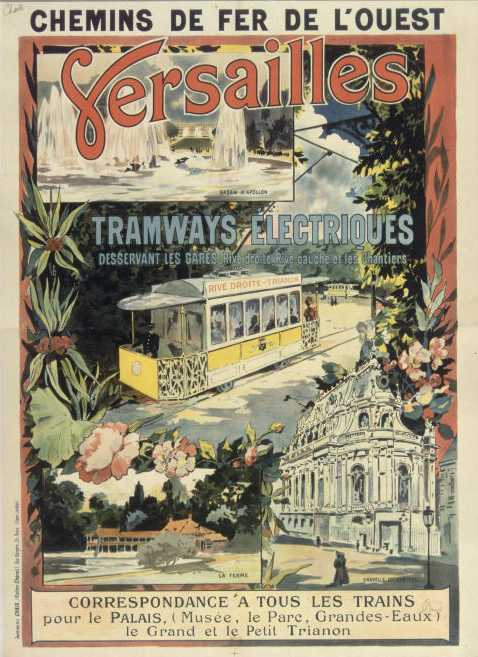 Chemins de fer de l'Ouest. Versailles. Tramways électriques desservant les gares Rive gauche, Rive droite et les Chantiers, 1899